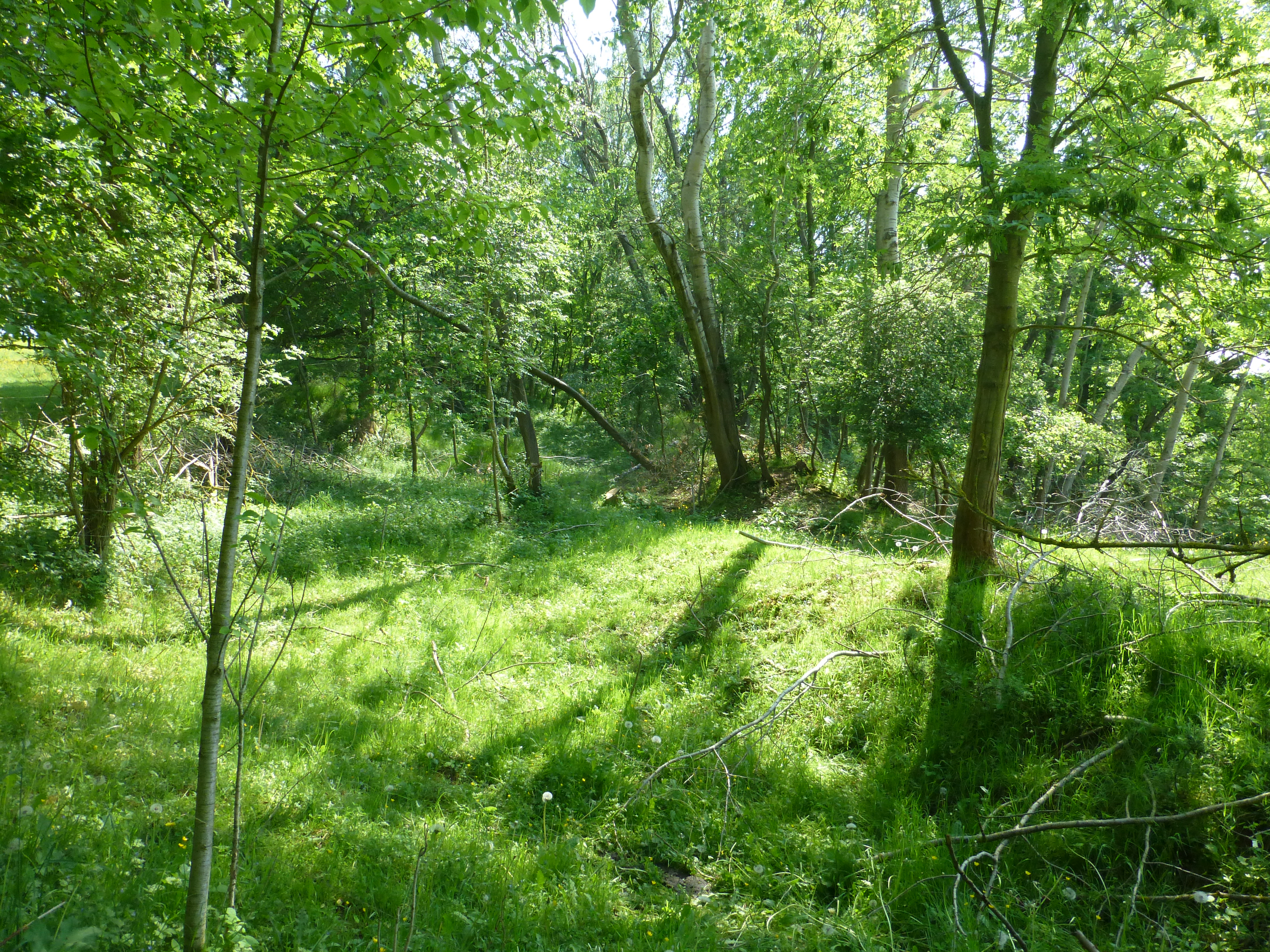 Beim Standort der ehemaligen Burg Westernhagen (Alte Burg) am Eichbach bei Berlingerode